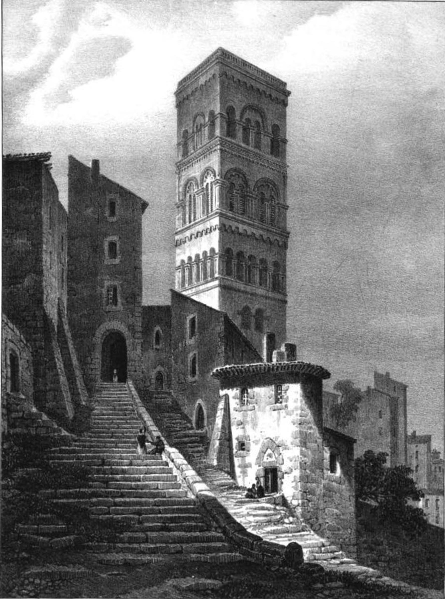 Valence (Drome) coté St Enleve